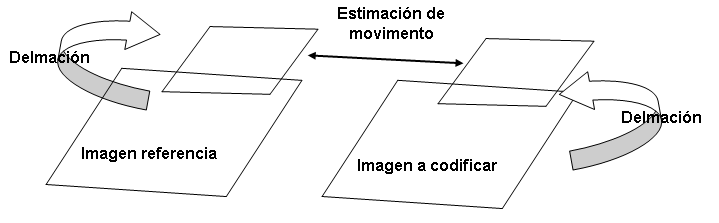 Lo hice yo mismo para entender mejor concepto que se explica en el articulo